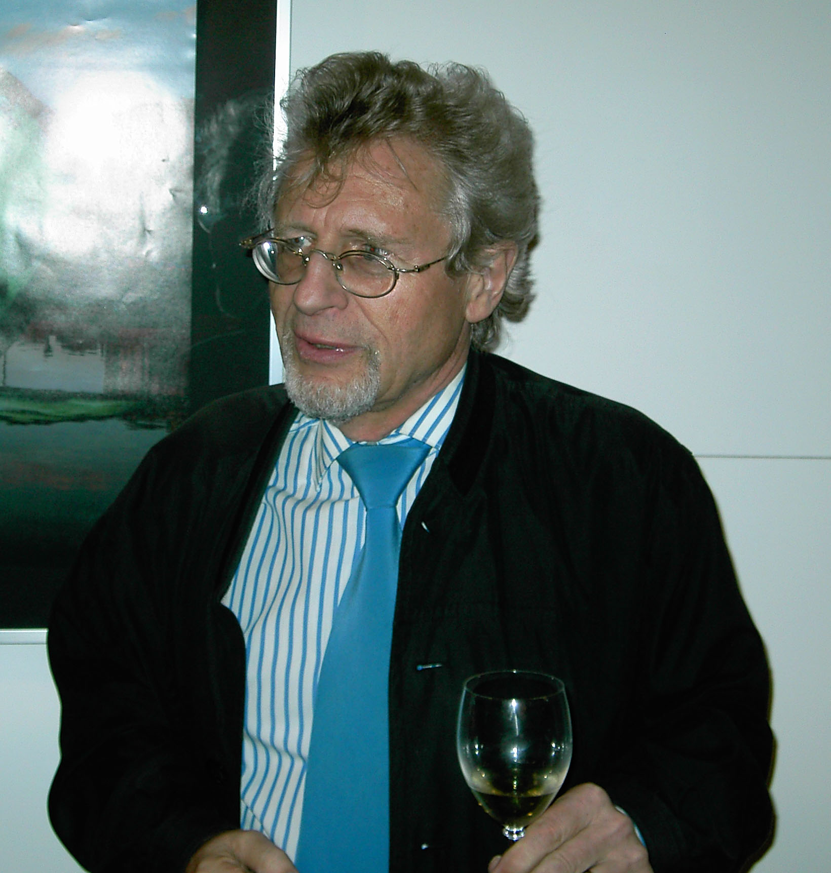 Helmut Müller, bayerischer Politiker (CSU), Bamberg